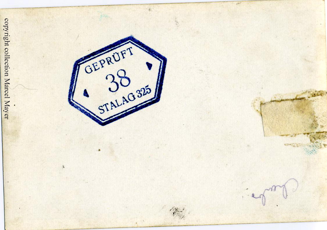 Estampille des autorités allemandes sur le verso des photos ramenesées du stalag 325 par le sculpteur Marcel Mayer.